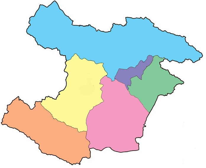 نقشه تقسیمات کشوری قزوین